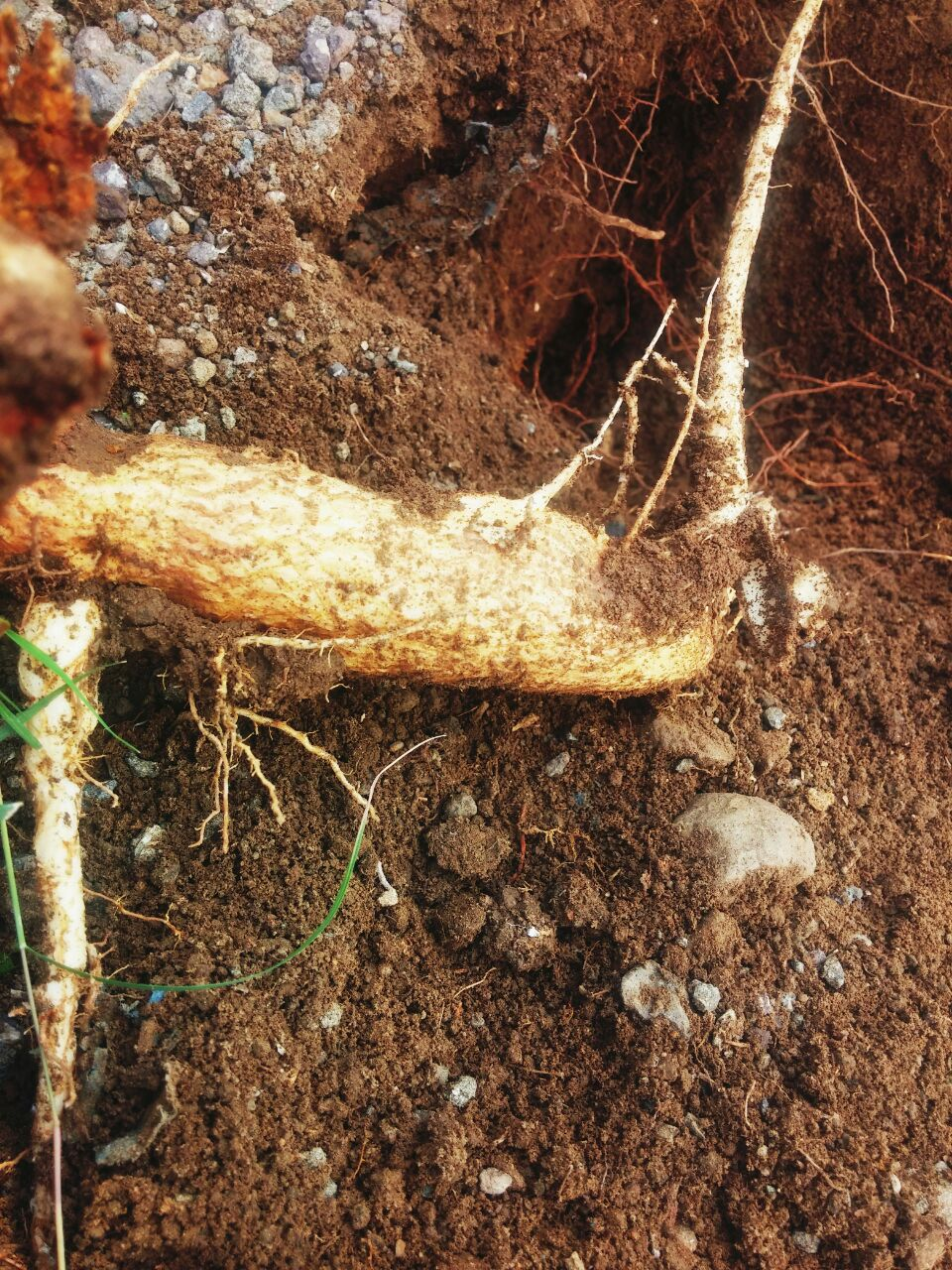 Jatropha Variegataجذور نبته ال